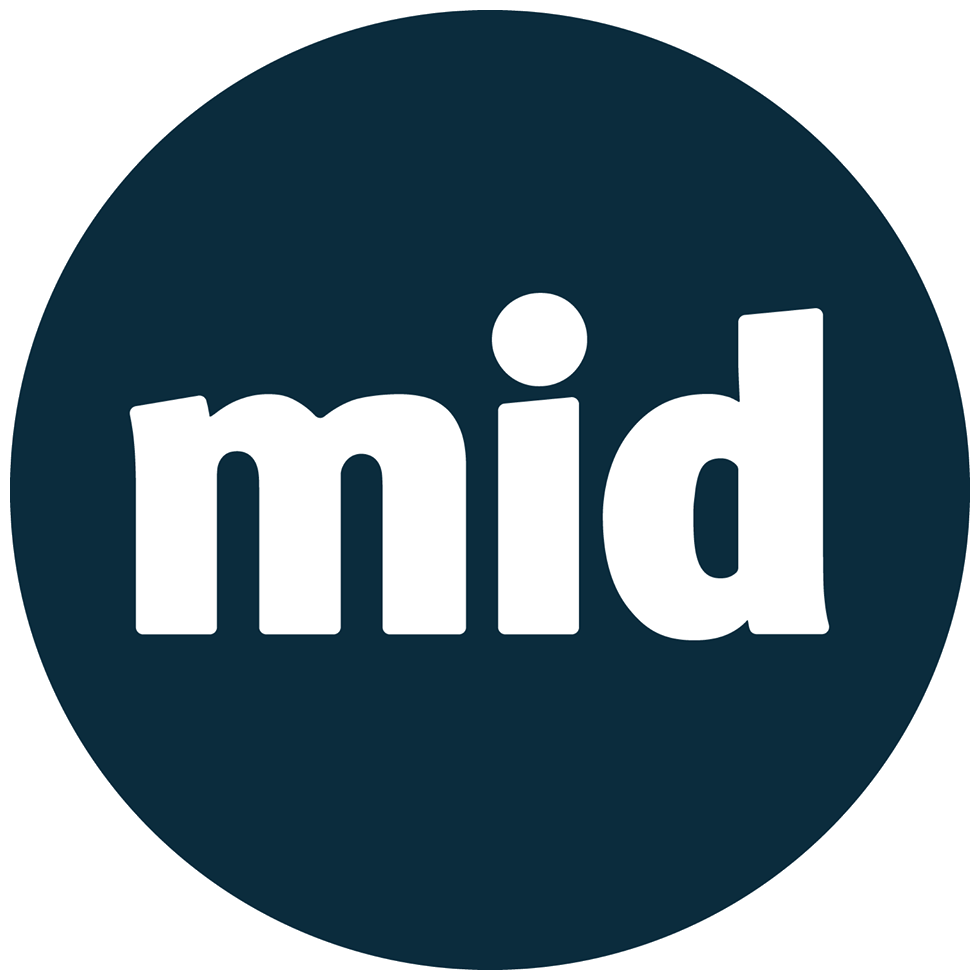 Movimiento de Integración y Desarrollo